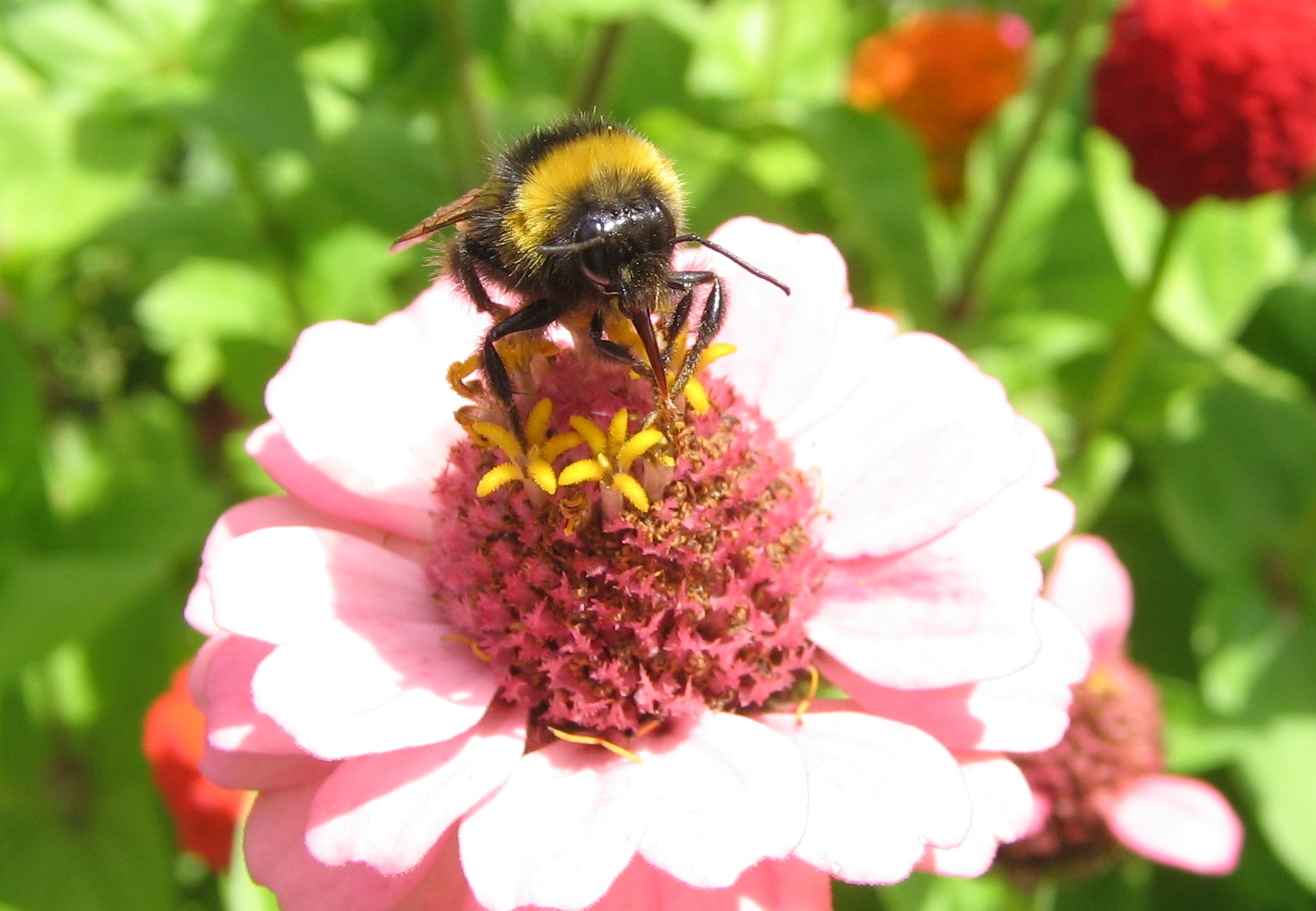 burdo suĉas nektaron el roza floro